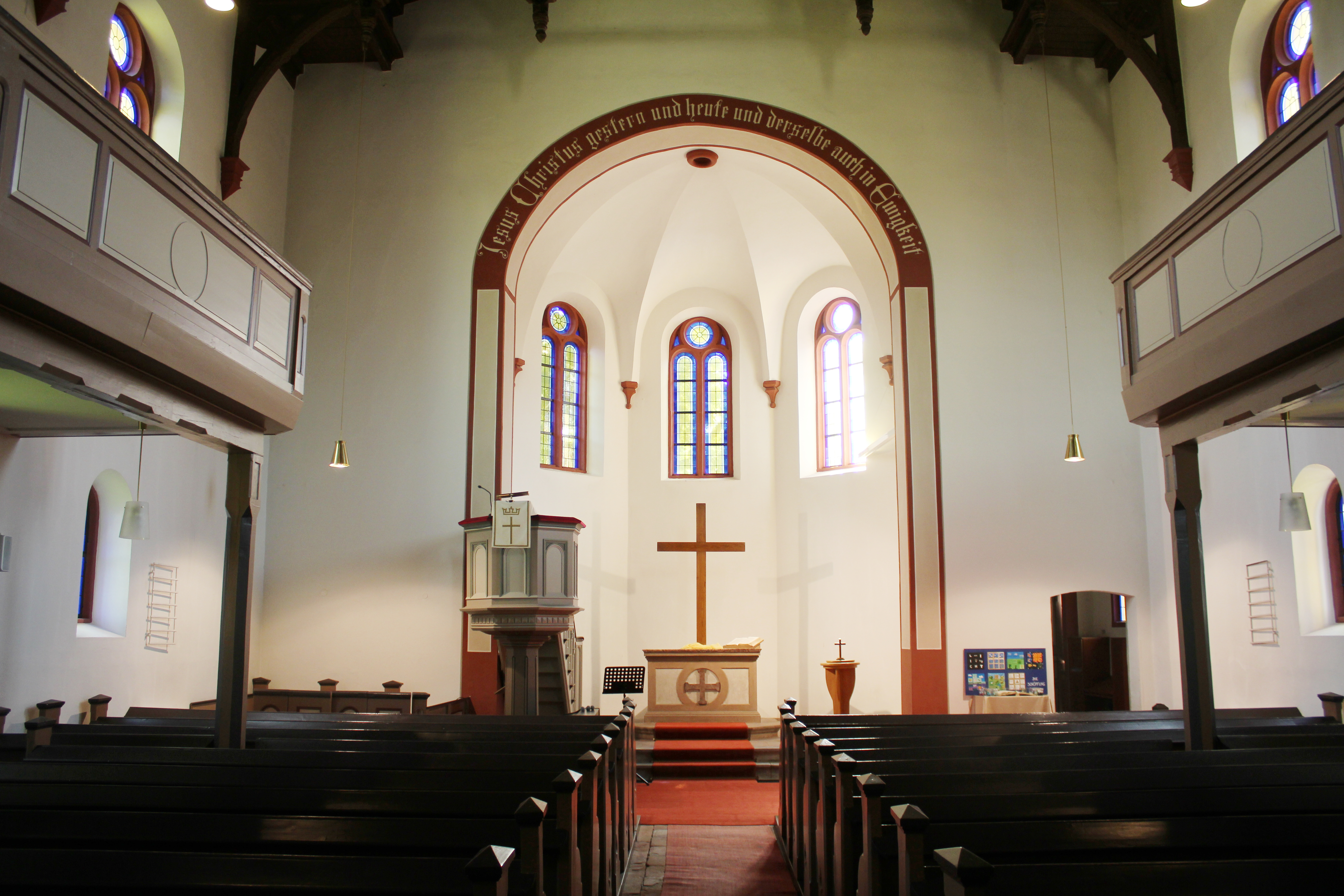 Ev. Kirche Garbenheim, Wetzlar, Lahn-Dill-Kreis, Hessen, Deutschland